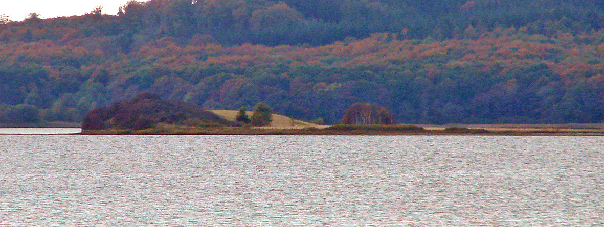 Vorsø Kalv i Horsens Fjord set fra Alrø